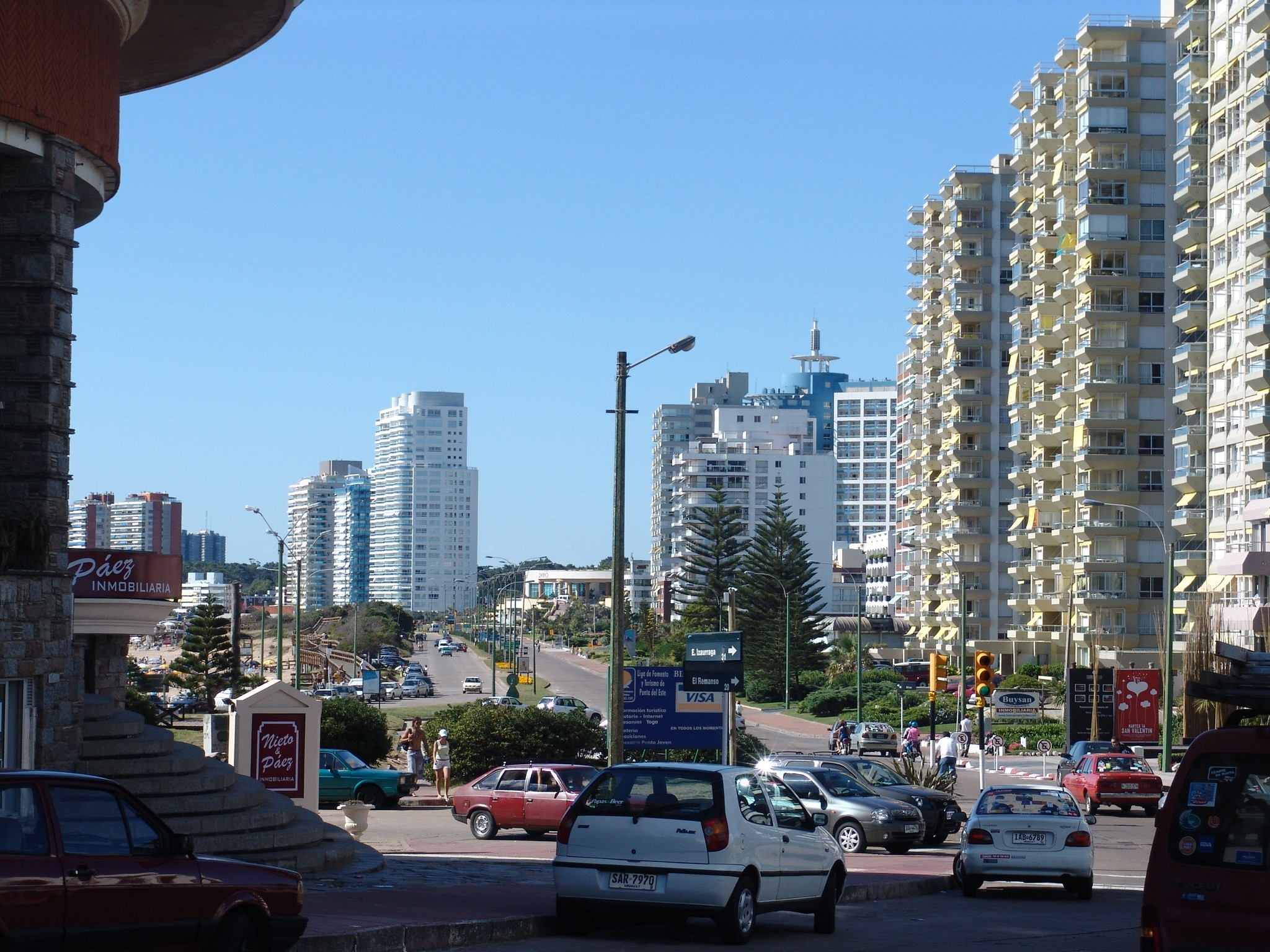 Calle de Punta del Este (Uruguay). Made by Alegsa